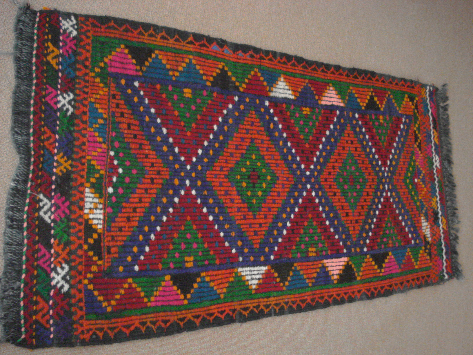 Handmade kilim made in Eşme in Uşak in Türkiye